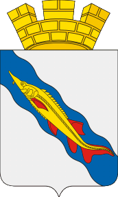 Современный герб города Ейска